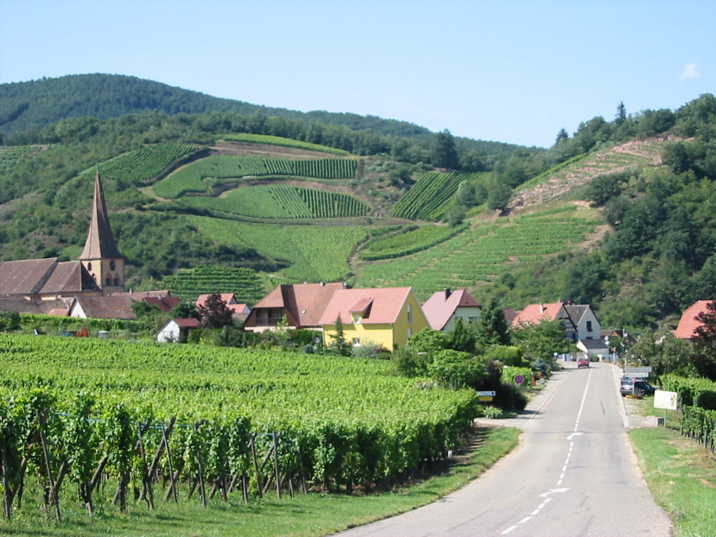 Entrée de Niedermorschwihr en venant de Turckheim